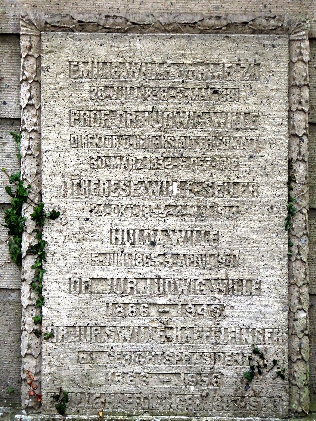 Ludwig Wille-von Meizl (1834¬–1912) Prof.Dr. Psychiater, Oberarzt, Direktor der Heilanstalt Friedmatt in Basel. Grab auf dem Friedhof Wolfgottesacker, Basel